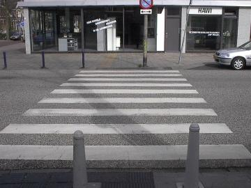 Zebrapad bij Station Zwolle]